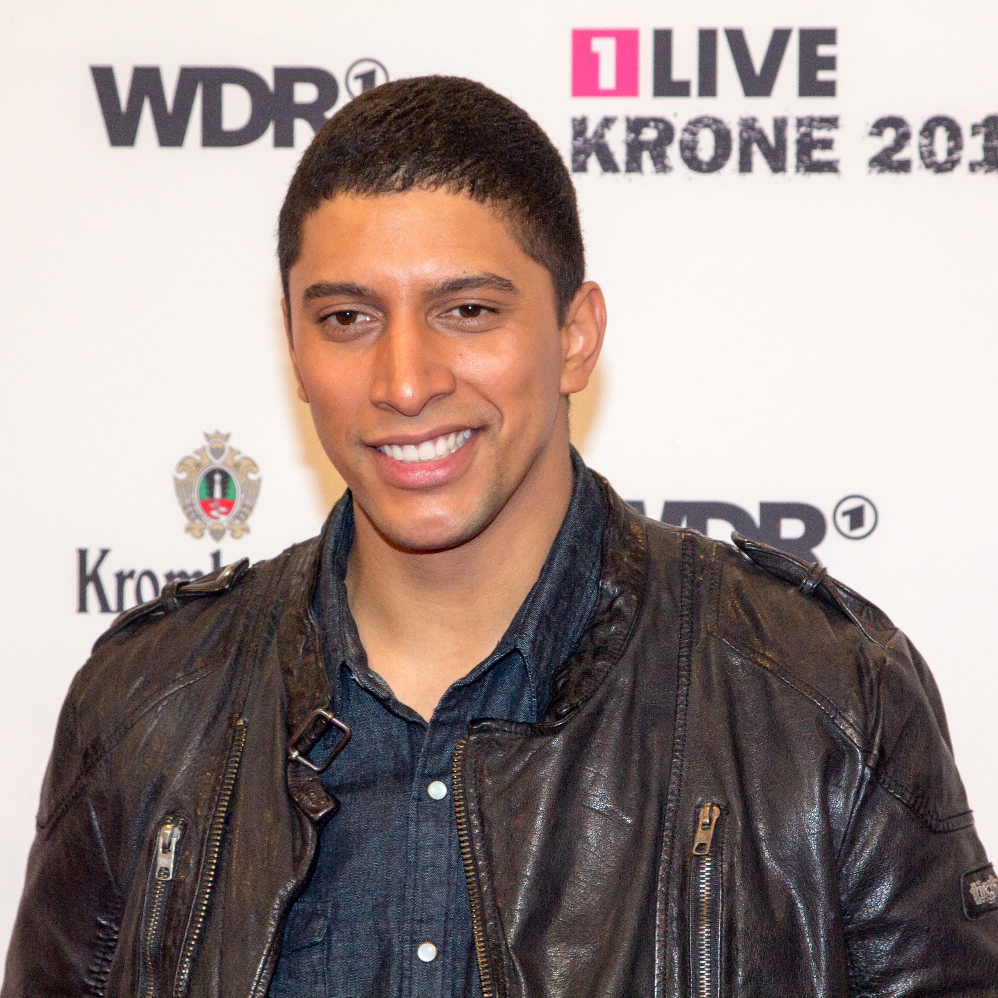 1LIVE Krone 2014 in der Bochumer Jahrhunderthalle: Andreas Bourani auf dem roten Teppich